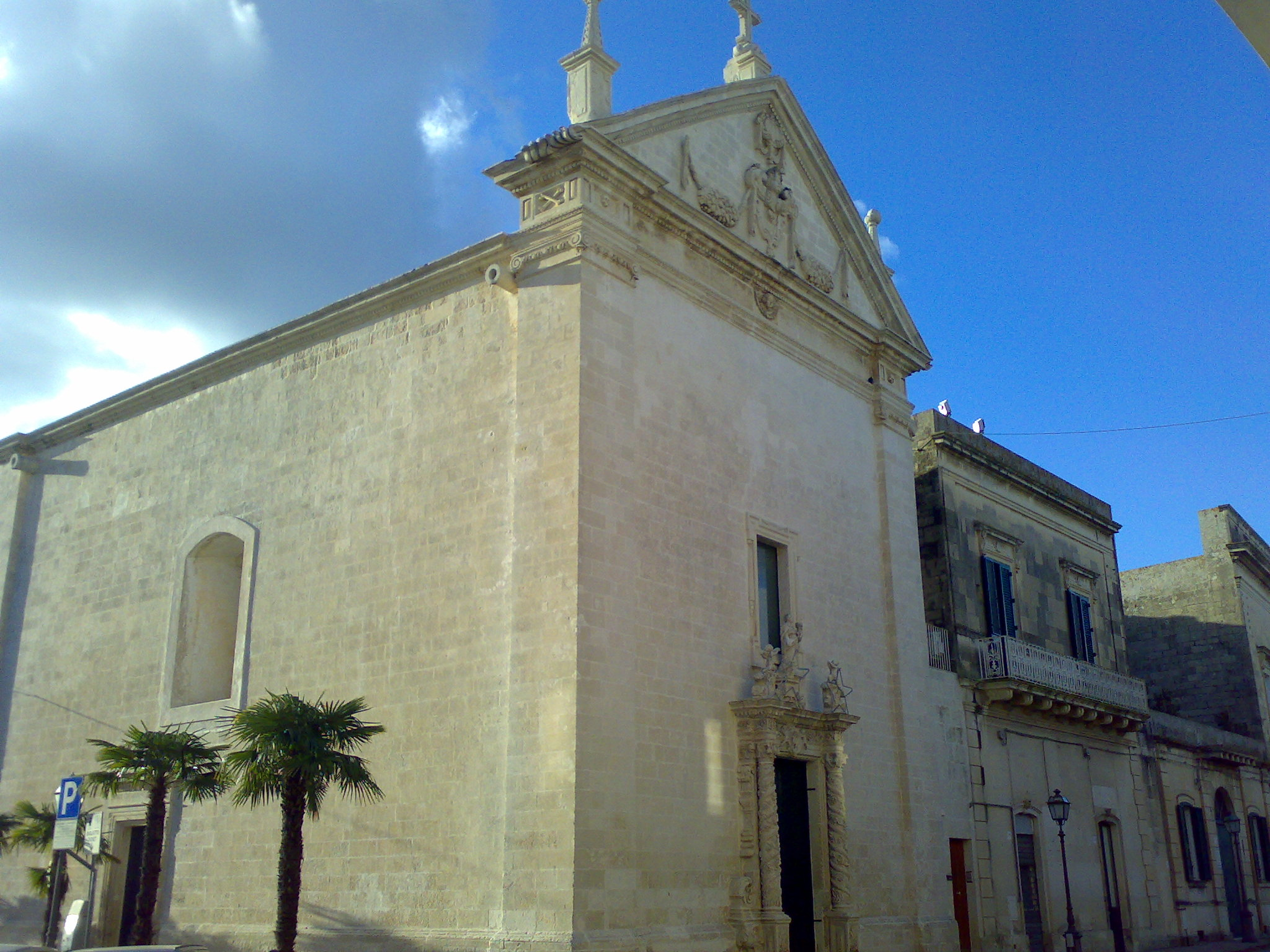 Chiesa Madonna delle Grazie, Maglie, provincia di Lecce